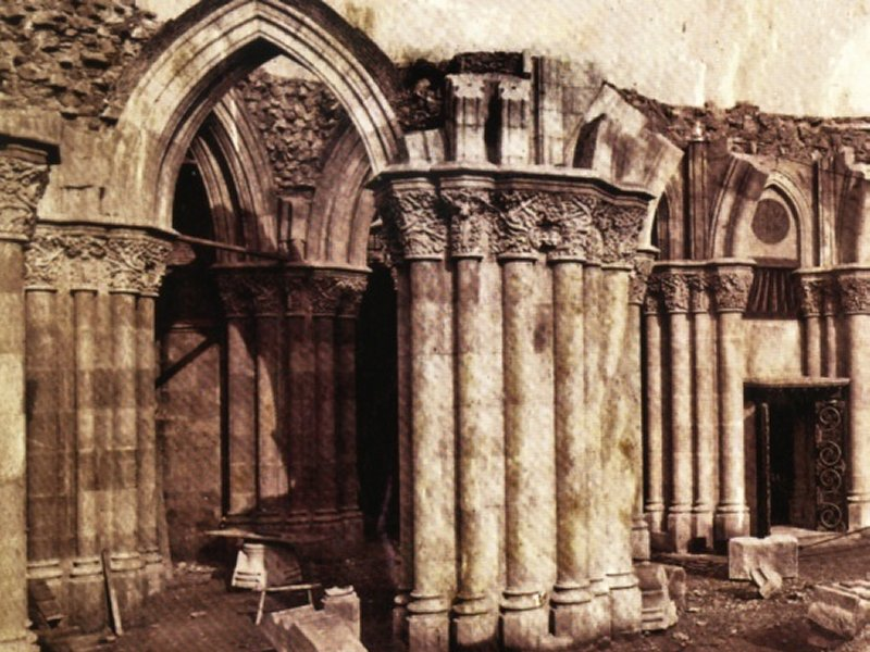 Obras de la cripta de la Sagrada Familia (1885).